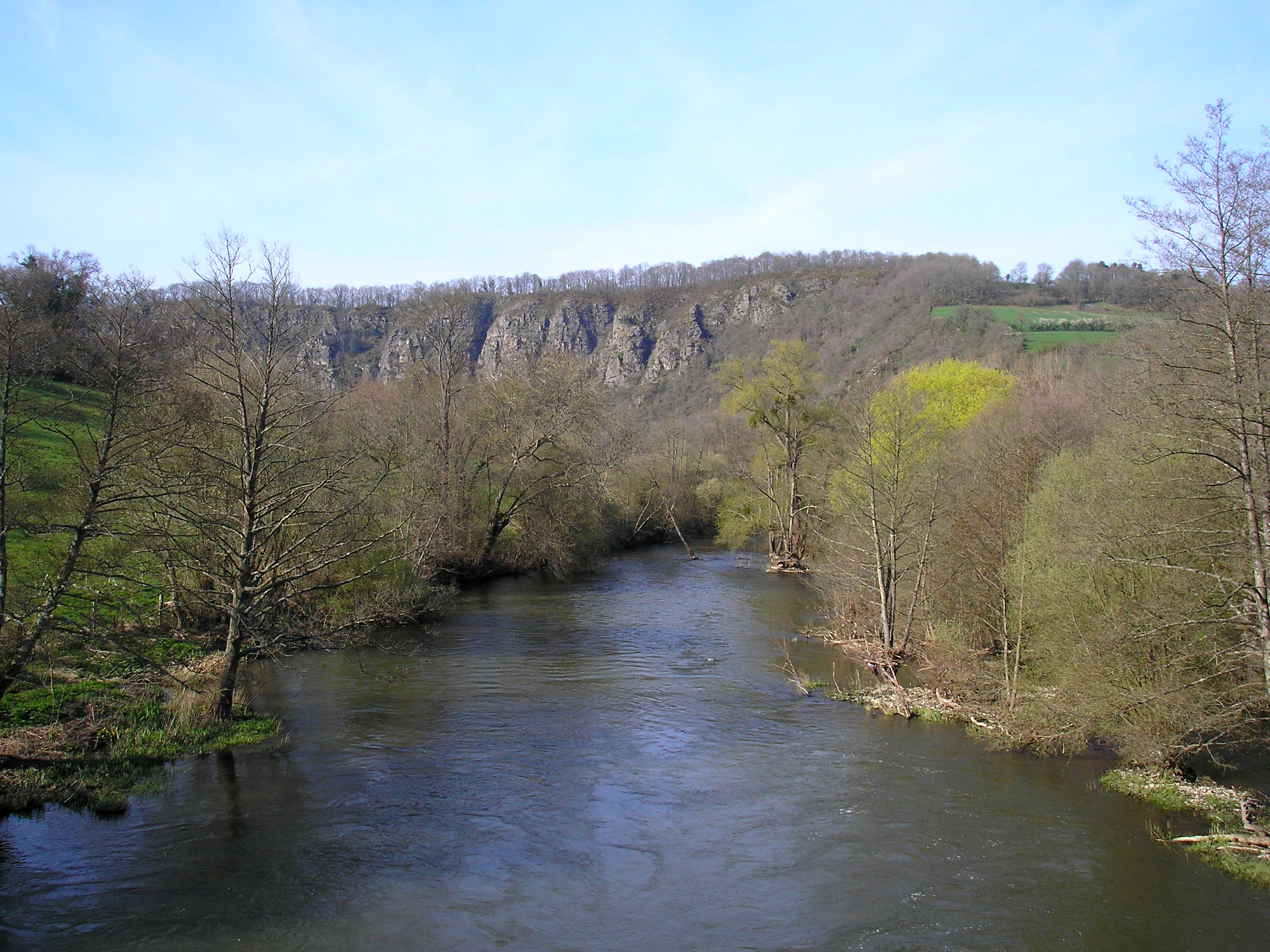 Clécy, Le Vey, Le Bô (Normandie, France). L'Orne et les rochers des Parcs.